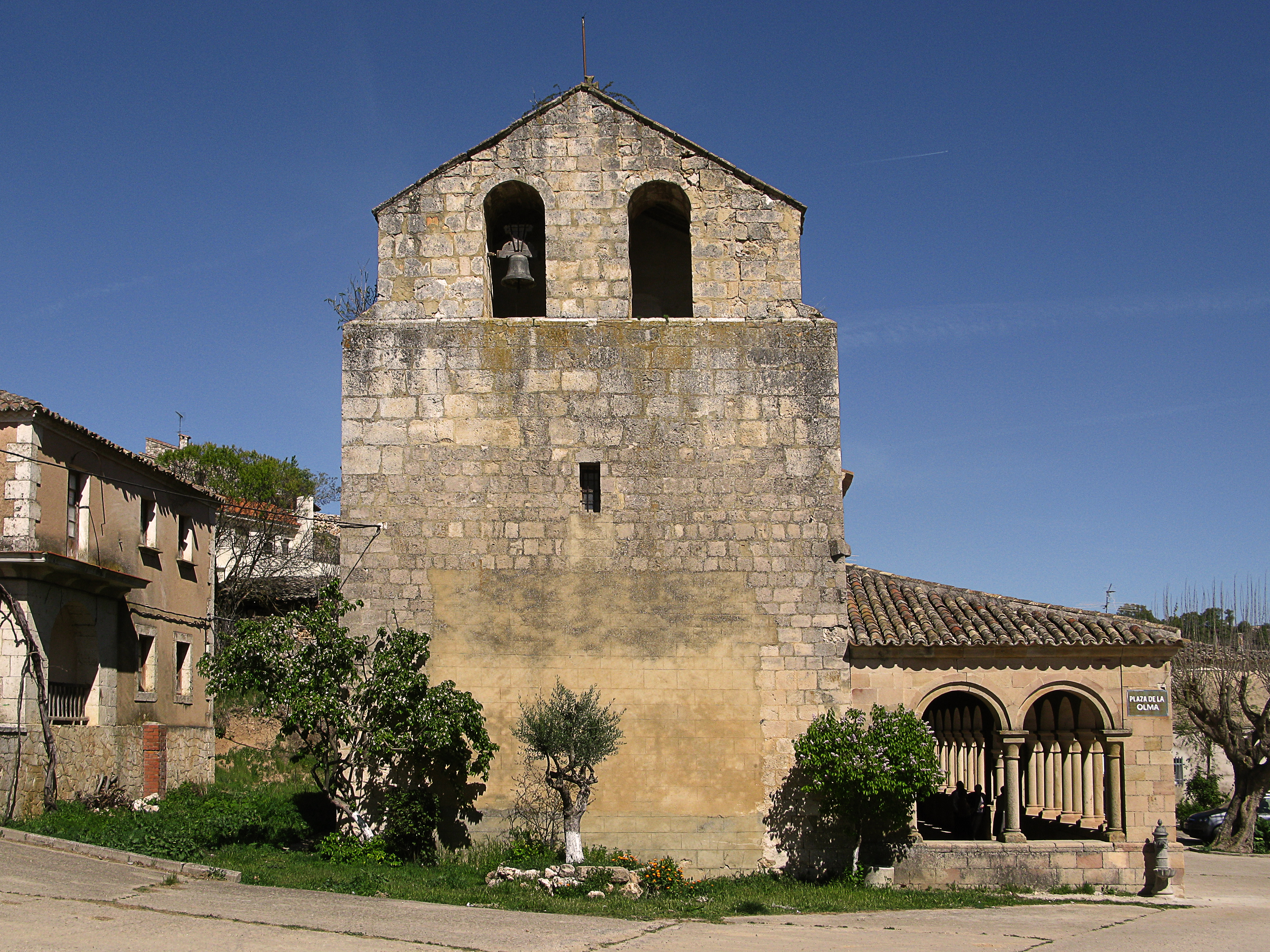 El principal patrimonio cultural de Yela es sin duda, su iglesia parroquial románica. Los patronos de Yela, son San Gervasio y San Protasio, «San Gervasio y San Protasio se celebran el día 19 de junio. Es el día de la fiesta del pueblo de Yela. Pues sois gloria de Yela por mártires aclamados; San Gervasio y San Protasio sednos nuestros abogados ......parte de una .cancion polular Tambien cuenta una leyenda ... de fechas "recientes" En el año 1970, un año de mucha sequía, el campo en el mes de mayo se estaba secando por falta de la lluvia, que no llegaba, y los meteorólogos no daban a corto plazo que fuera a llover. El pueblo de Yela tiene una gran devoción a los Santos y decidieron sacarlos en procesión el 20 de mayo por la mañana, todo el pueblo, e hicieron el milagro ese mismo día Se puso nublo y al día siguiente llovía y continuó lloviendo varios días. La cosecha fue buena porque llovió lo suficiente»